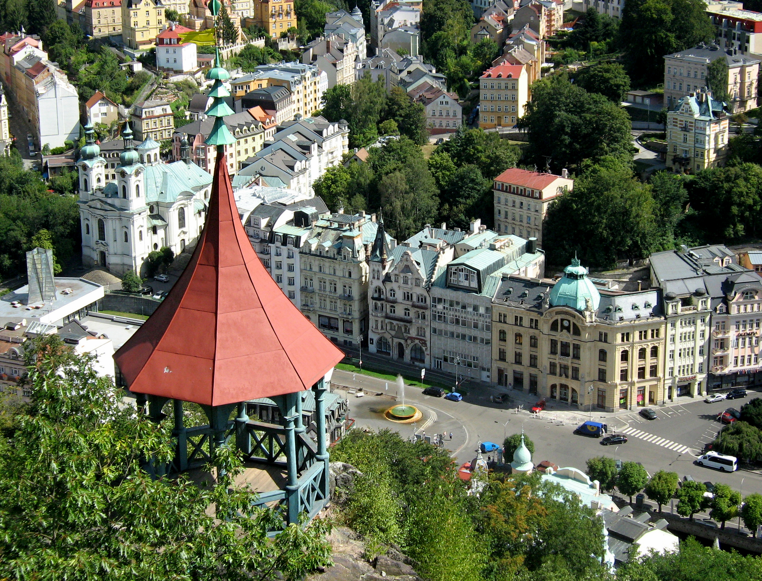 Mayerův gloriet nad částí centra Karlových Varů